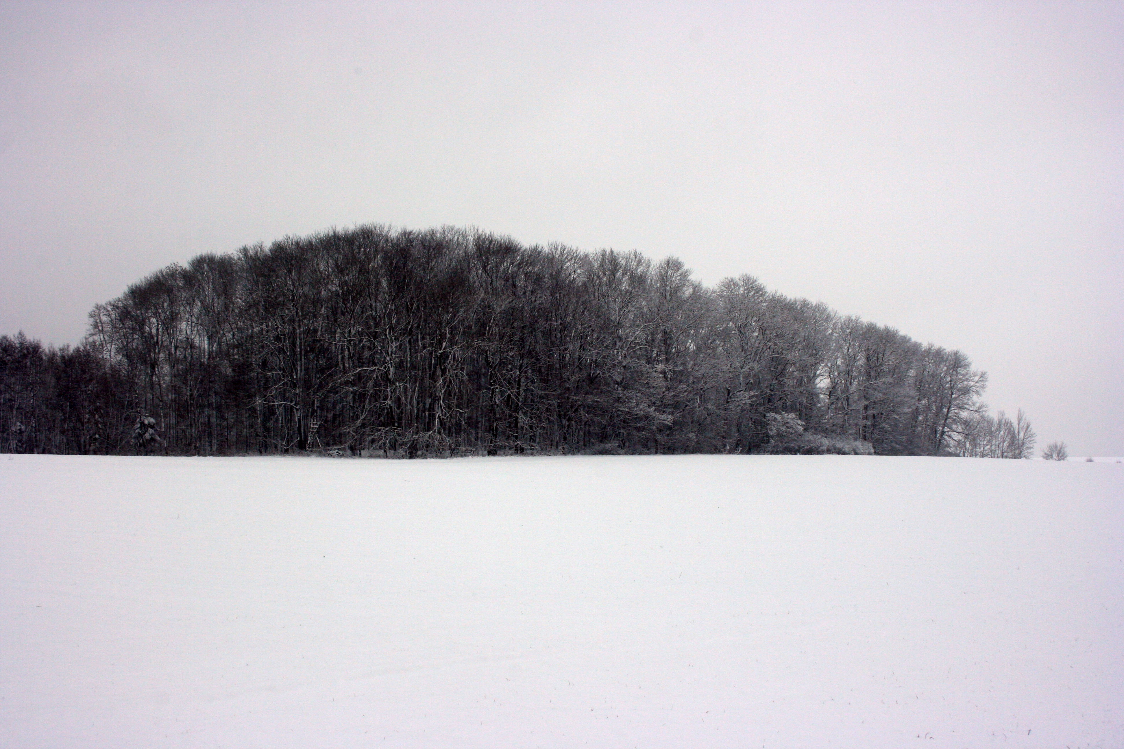 Keltische Viereckschanze in Langenburg